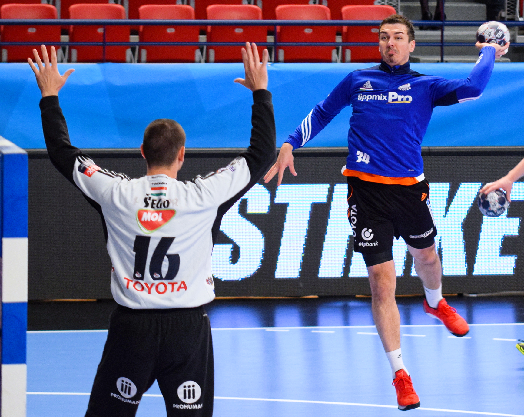 Rencontre de quart de finale de la ligue des champions 2016-17 entre le PSG et Pick Szeged. A Coubertin, le 29 avril 2017.